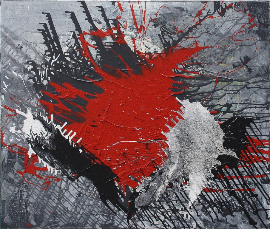 grau / rot / schwarz Mischtechnik auf Leinwand 100 cm x 120 cm